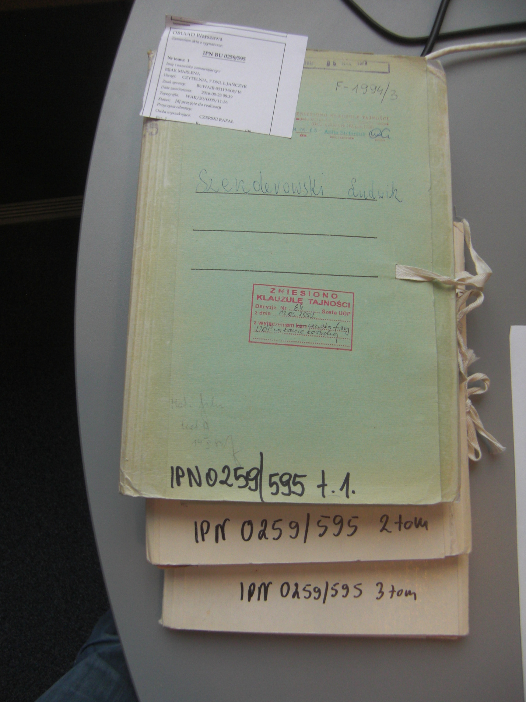 IPN 0259/595 t 1-3, materiały pochodzące z przesłuchań Ludwika Szenderowskiego